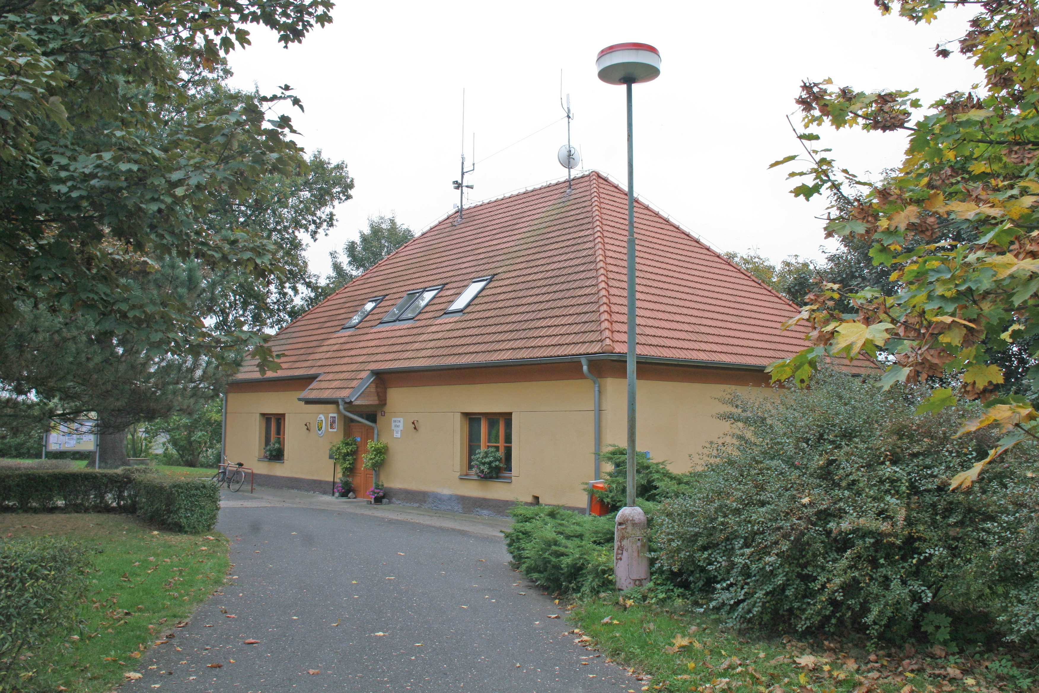 Krakovany obecní úřad